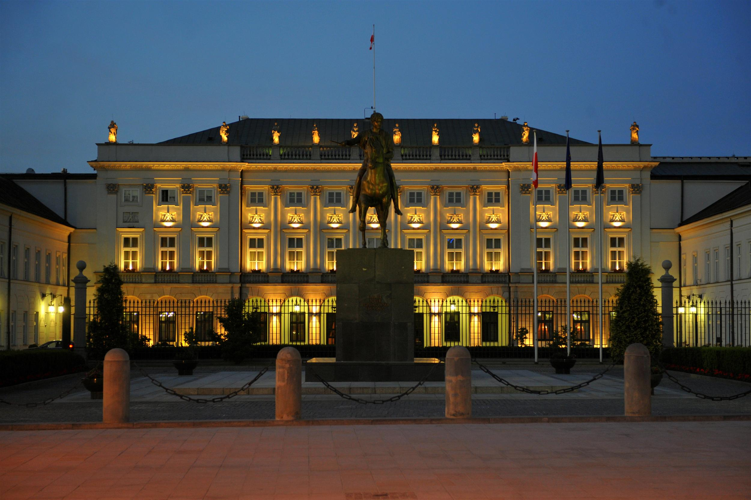 Wieczorna iluminacja Pałacu Prezydenckiego w Warszawie